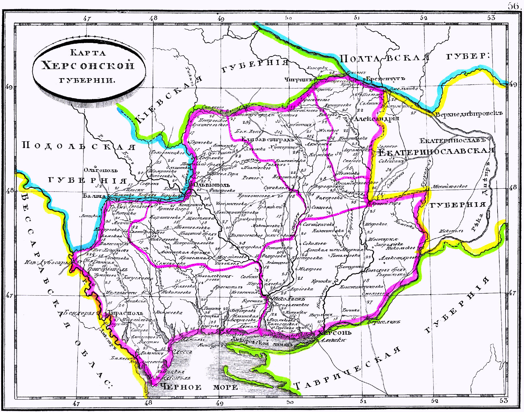 Карта Херсонской губернии, 1835